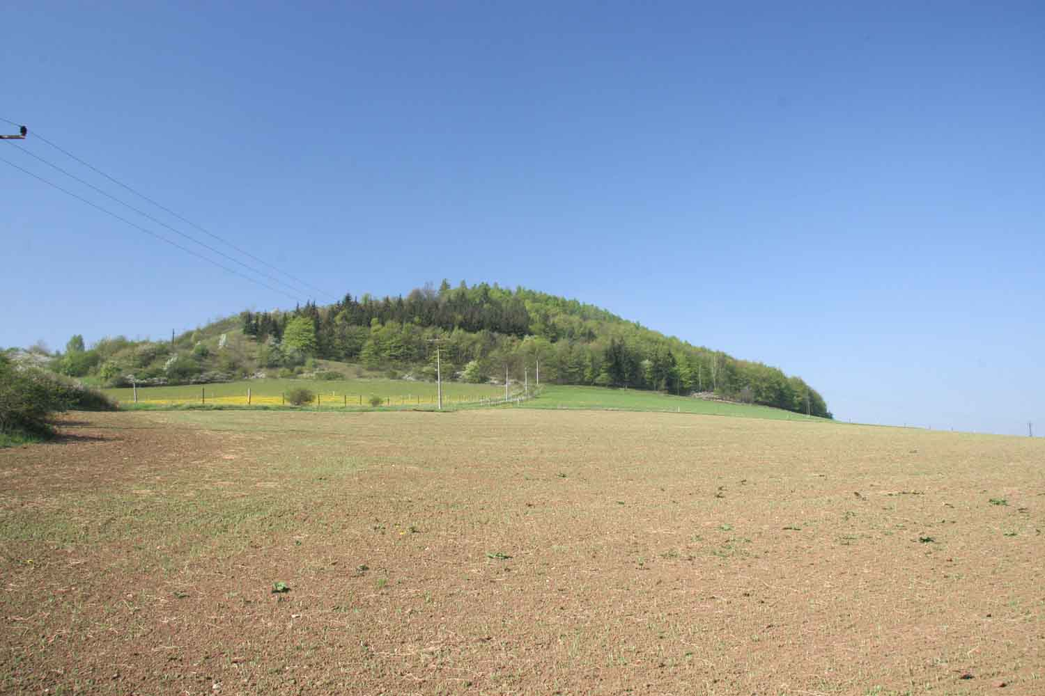 vrch Damil u Tetína